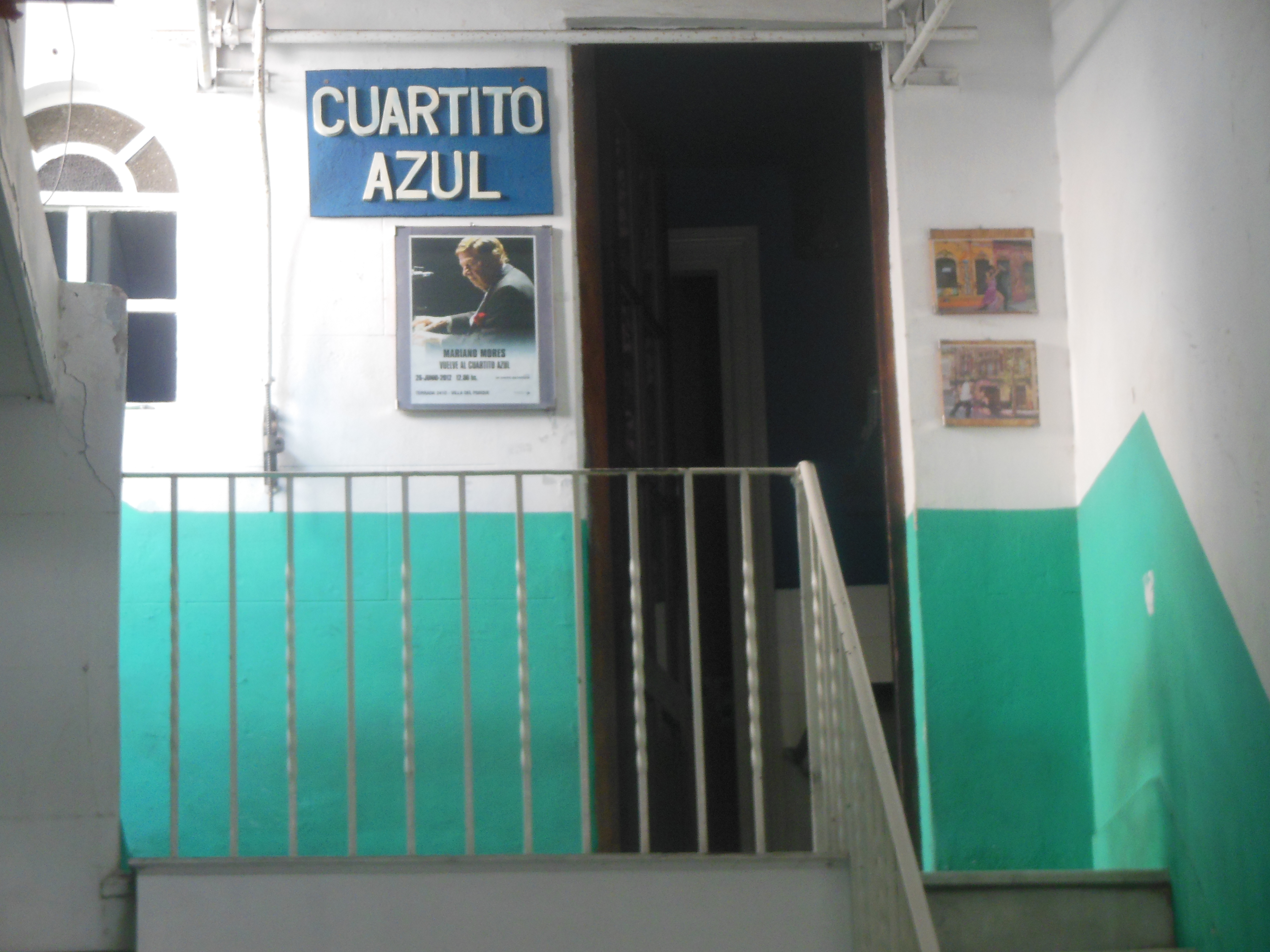 Cuarto donde vivió el músico Mariano Mores, y que inspiró al tango "Cuartito Azul"